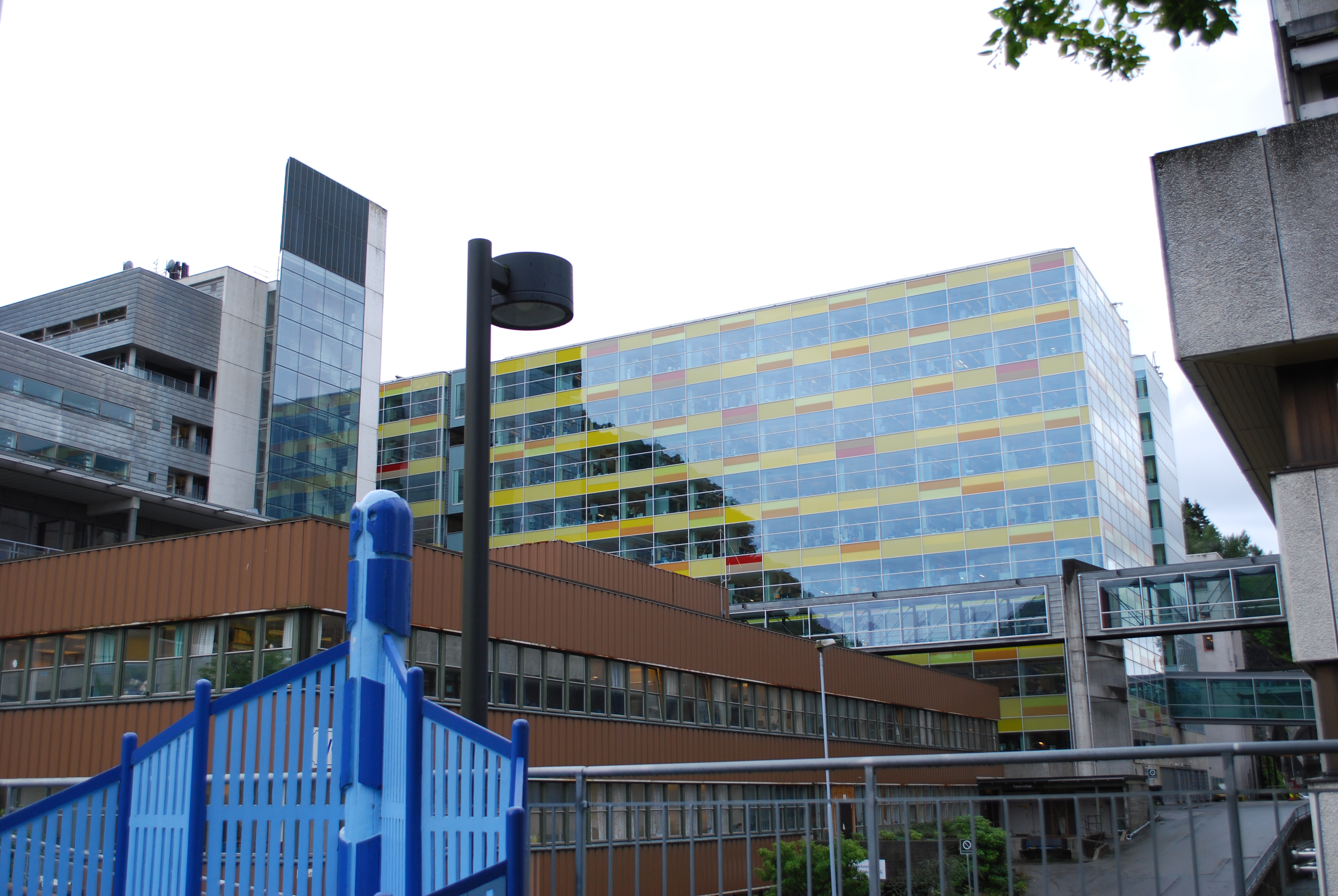 Description=Haukeland Universitetssykehus